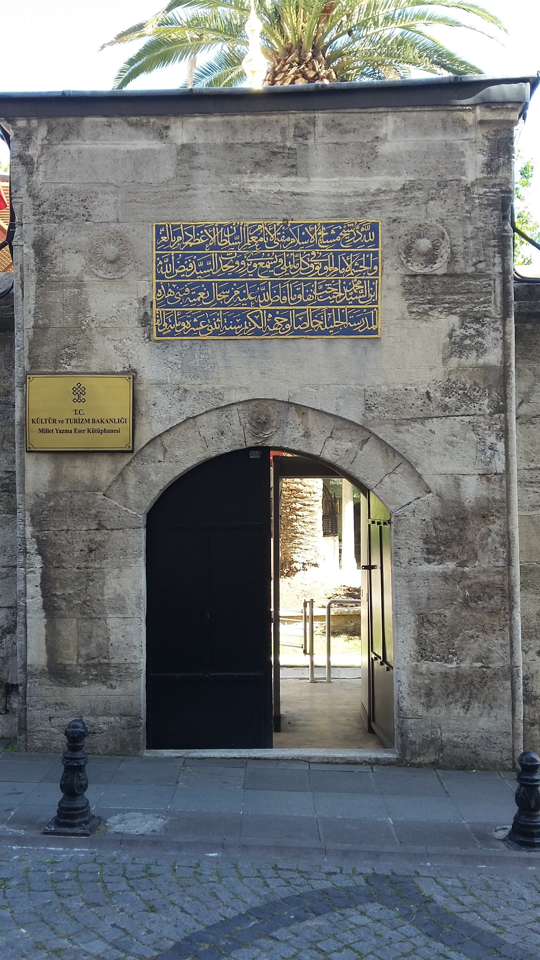 Millet Yazma Eser Kütüphanesi, Fatih, İstanbul